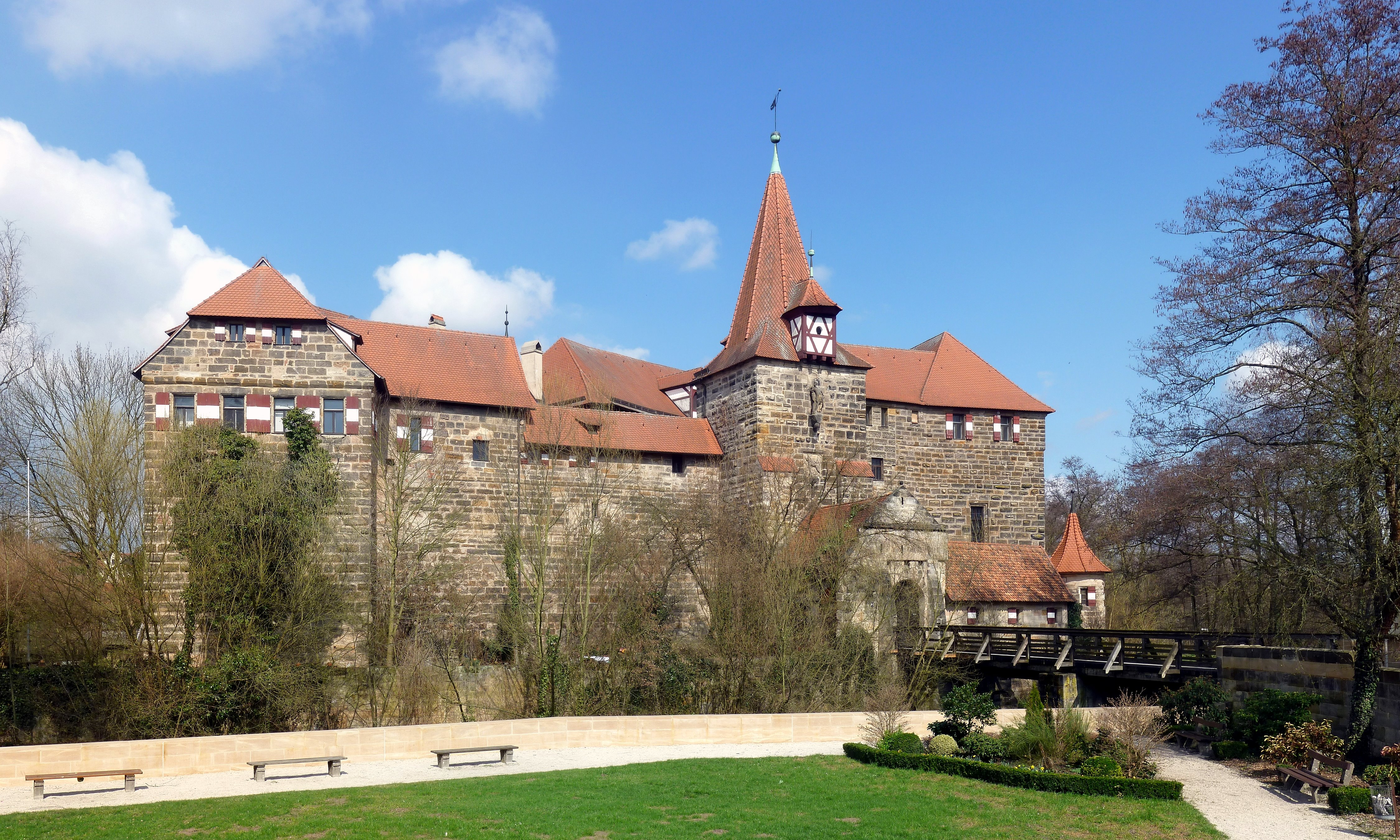 Wenzelschloss bei Lauf an der Pegnitz. Die ehemalige Kaiserresidenz liegt auf einer Insel in der Pegnitz in Franken. Die heutige Anlage wurde im 14. Jahrhundert erbaut und wird seit 1985 von der Akademie der Bildenden Künste Nürnberg als Außenstelle genutzt. Im Schloss ist der wohl europaweit bedeutendste Wappensaal aus dem Jahre 1360 mit etwa 120 Wappen erhalten.